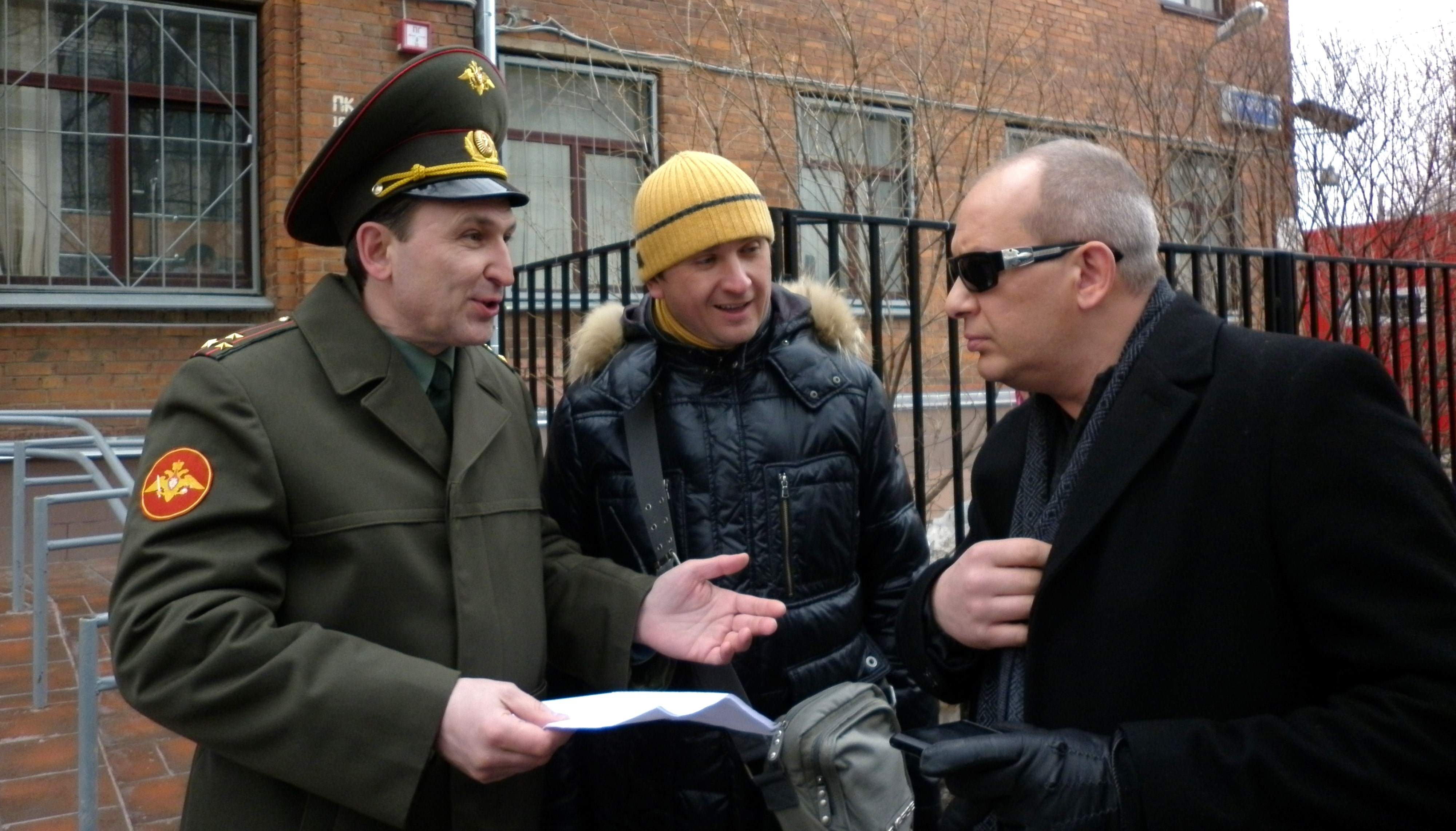 Кордон следователя Савельева - 2012